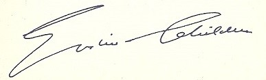 Firma di Erskine H. Childers, quarto Presidente d'Irlanda (1973-1974)